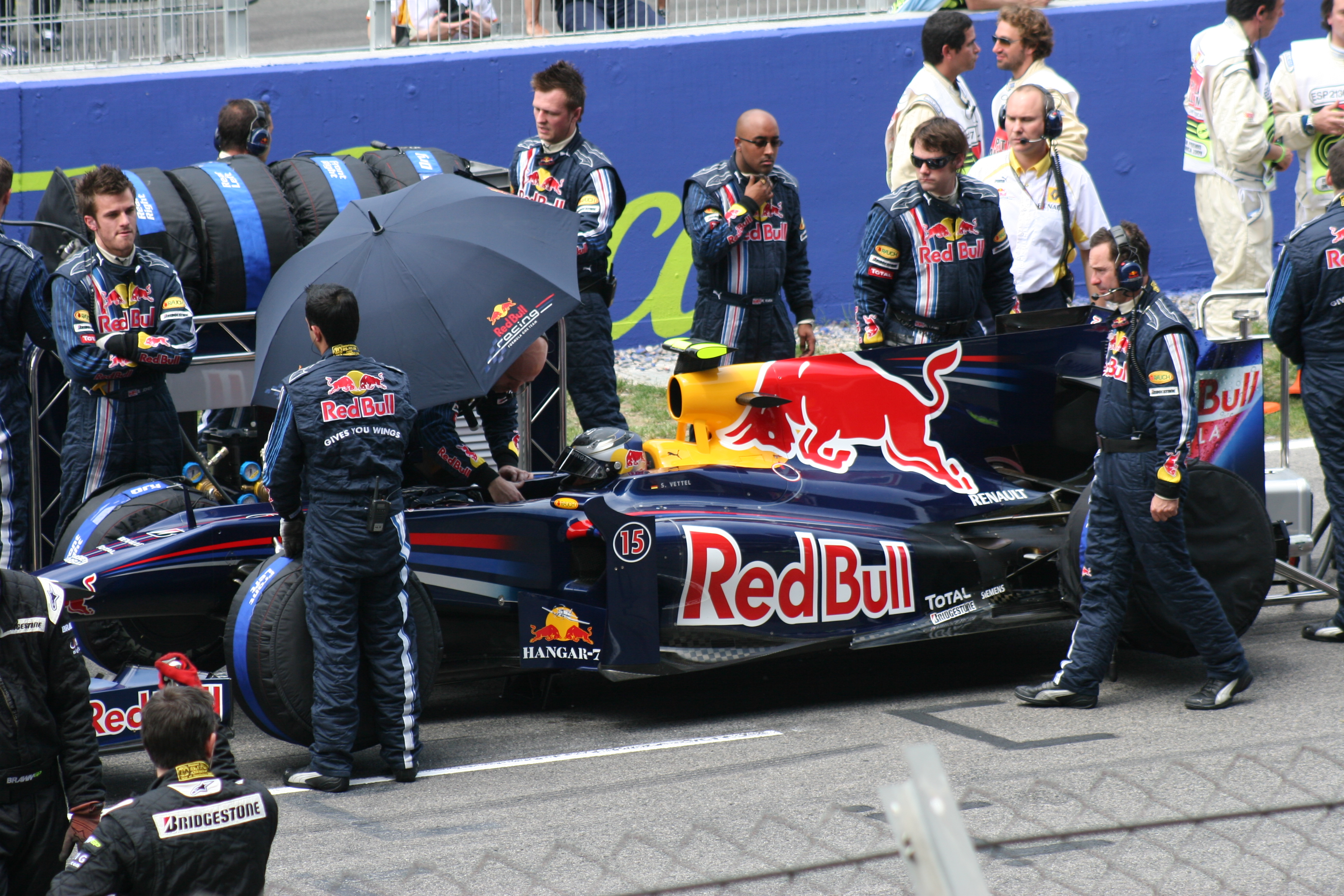 Vettel.Spain.09